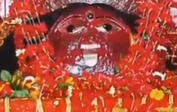 নলহাটেশ্বরী মা